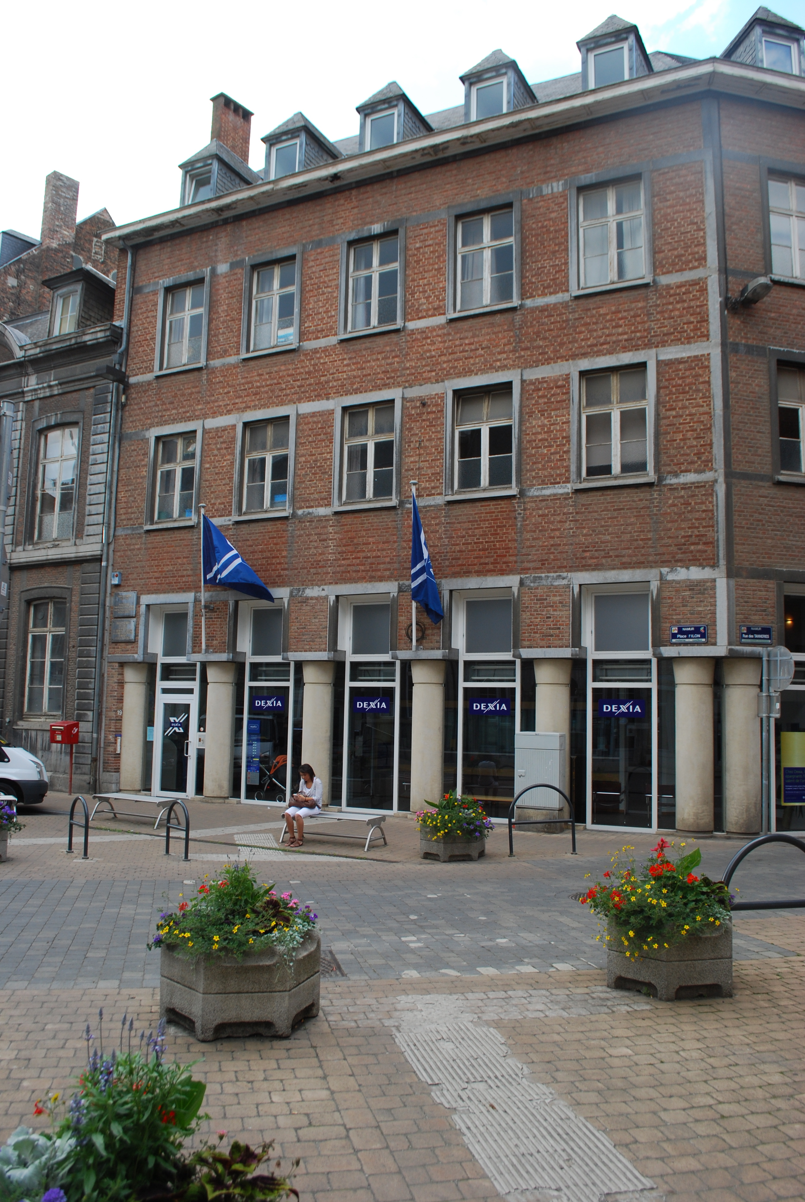 La place de l'Ilon à Namur.